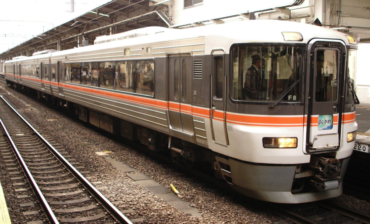 特急ふじかわ